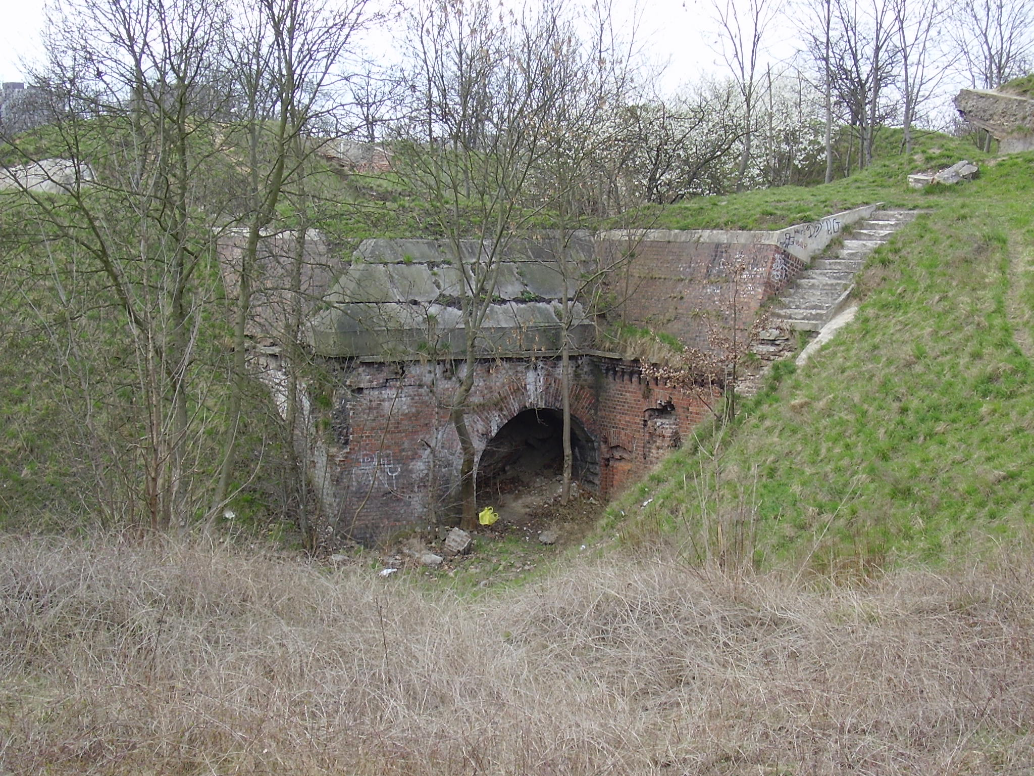 Wyjazd artyleryjski na prawy dziedziniec fortu